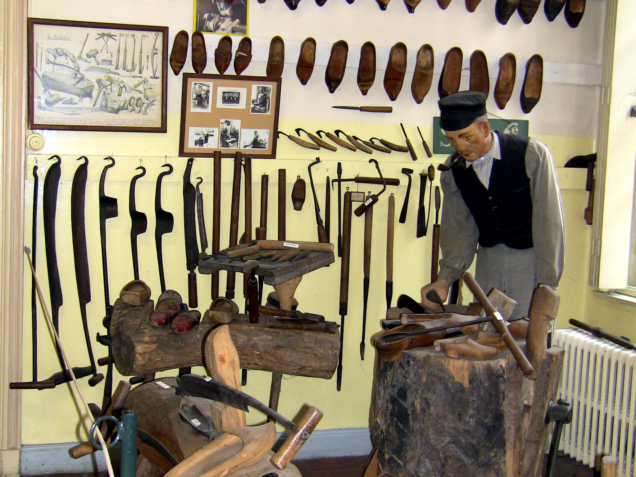 reproduction de la vie quotidienne des métiers de Tournai